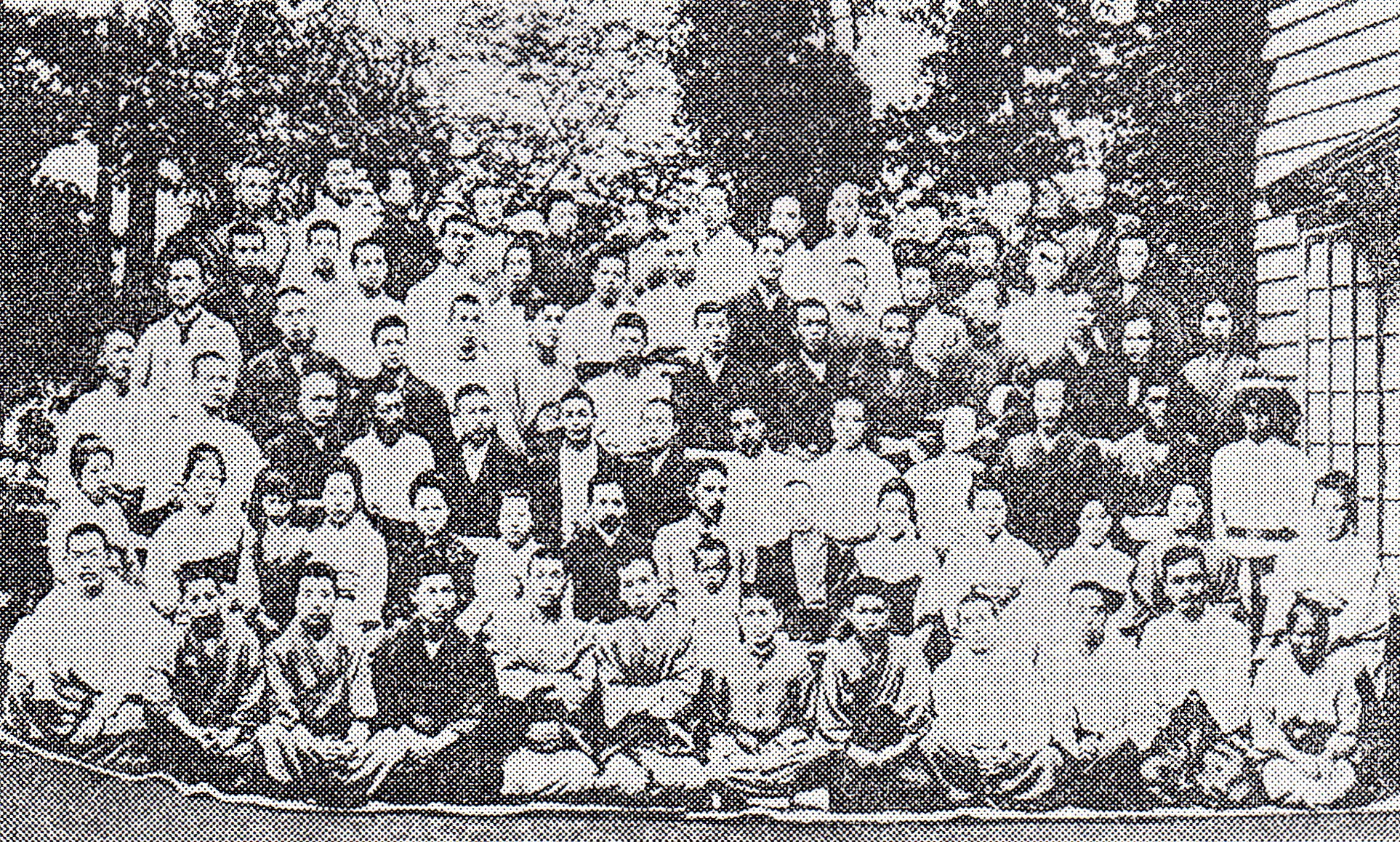 1902年7月25日から8月4日まで東京府角筈で行われた、内村鑑三による第三回夏期講談会の参加者による集合写真